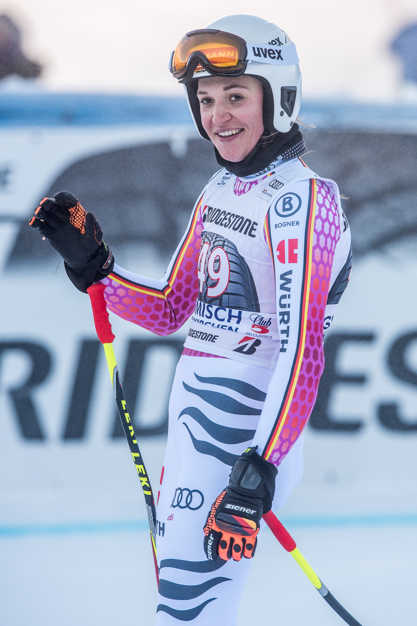 64. Kandahar Rennen,Audi FIS Ski Weltcup Garmisch-Partenkirchen,Damen Abfahrt,Kandahar,Ladies Downhill,Meike Pfister